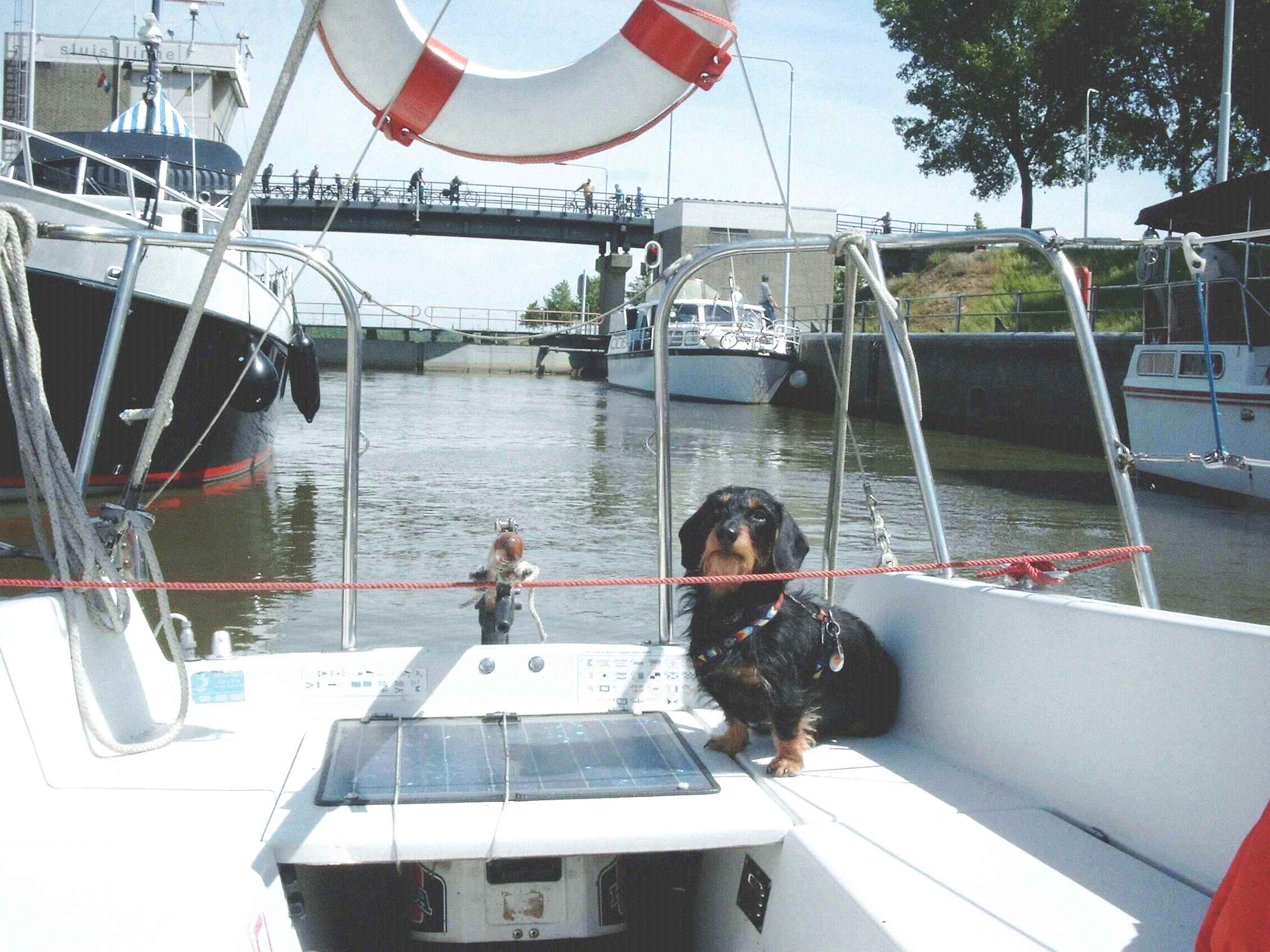 Maaschleuse Linne bei Linne/Roermond